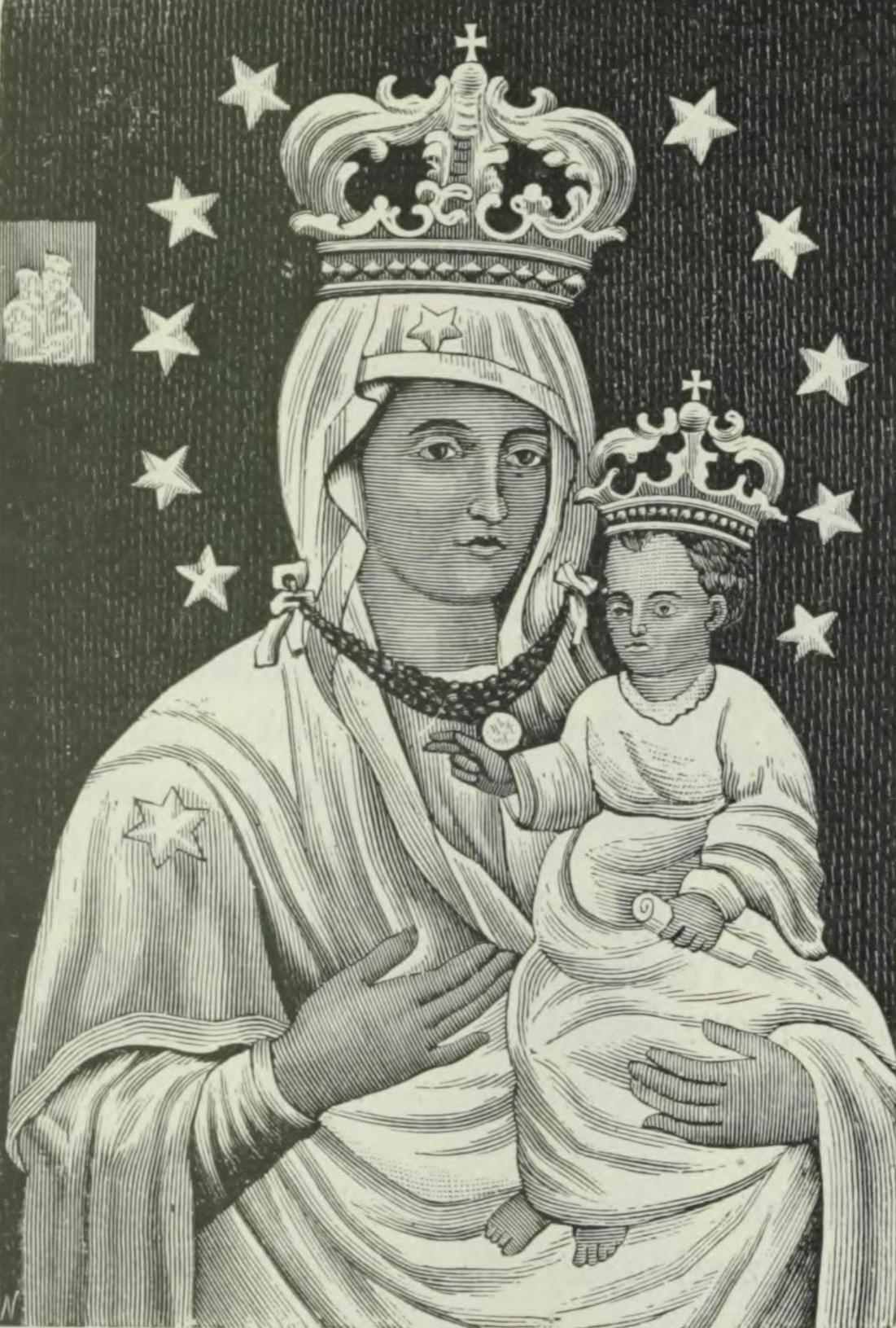 Тернопільська чудотворна ікона Матері Божої, репродукція з 1904 року